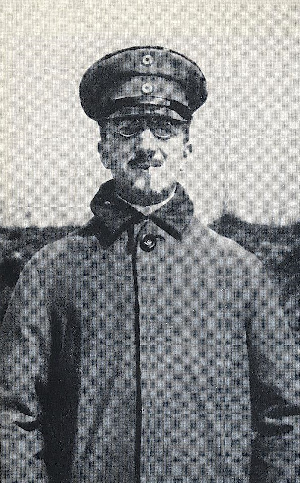 Alfred Döblin, 1916